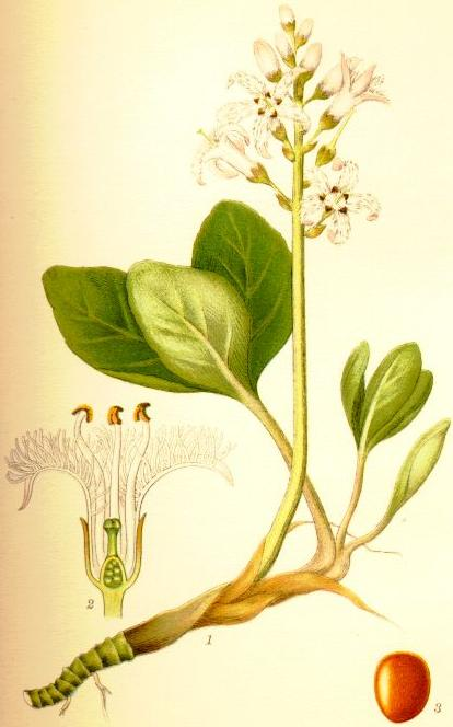 Vattenklöver (Menyanthes trifoliata) stycke av stjälken (eller undervattensstammen) med blad och blomstälning, blomma i längdgenomskärning (3/1), frö (5/1)